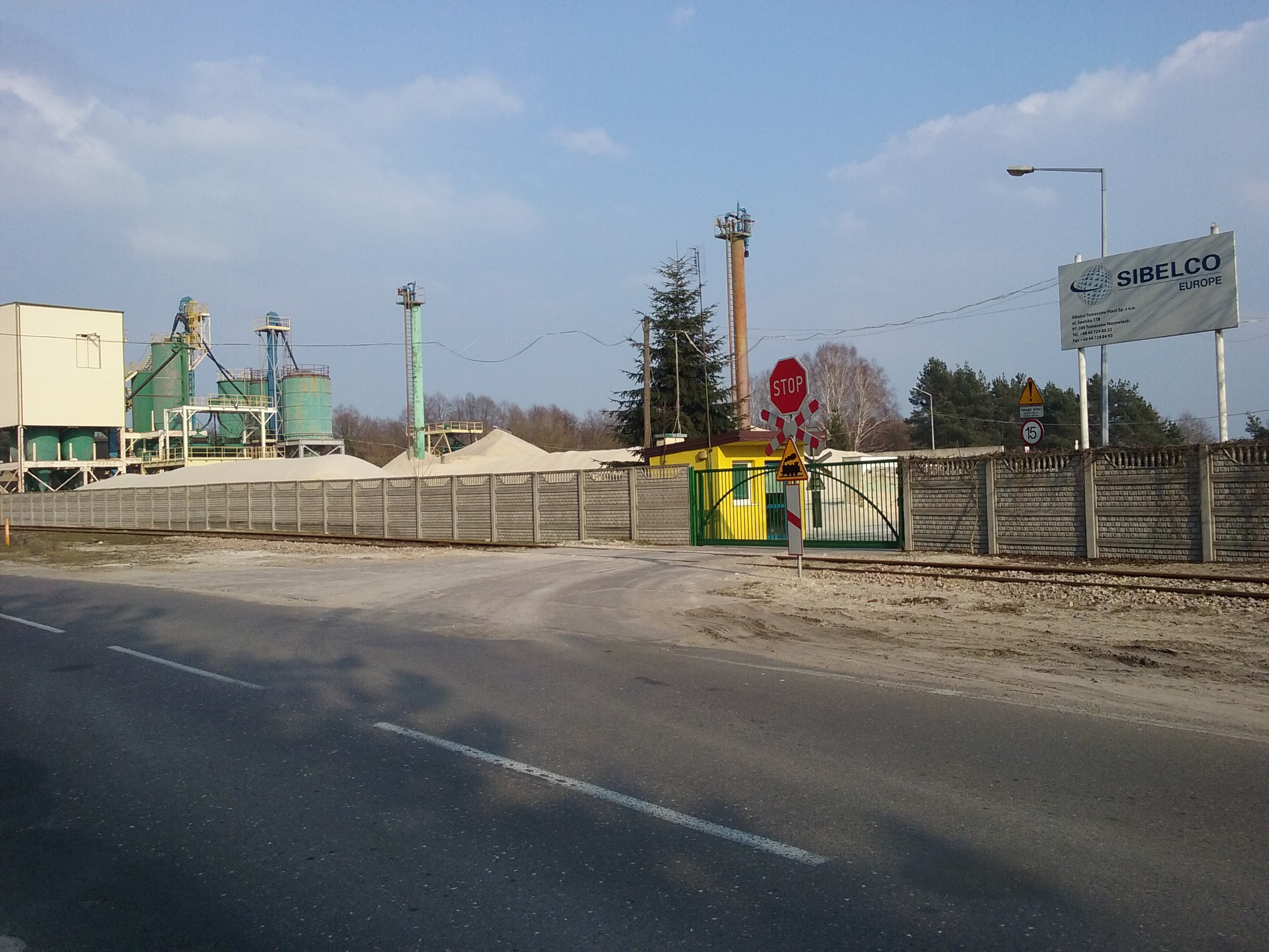 Tomaszów Mazowiecki w województwie łódzkim. PL, EU. Beligijskie Sibelco wcześniej jako Ankerpoort, producent producent surowców mineralnych. Odział firmy przy ulicy Spalskiej w Tomaszowie Mazowieckim. CC0